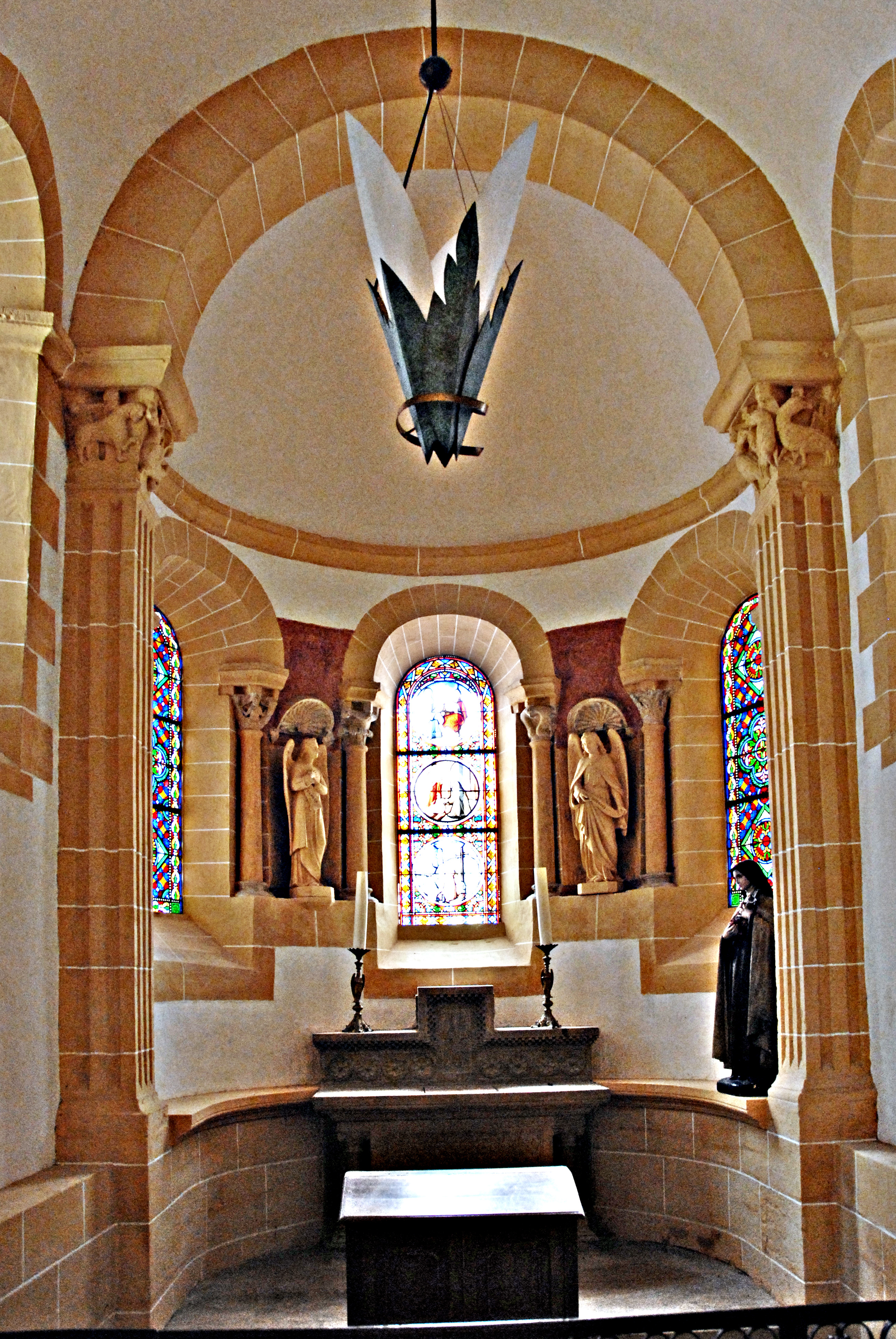 Kranzkapelle, Apsis